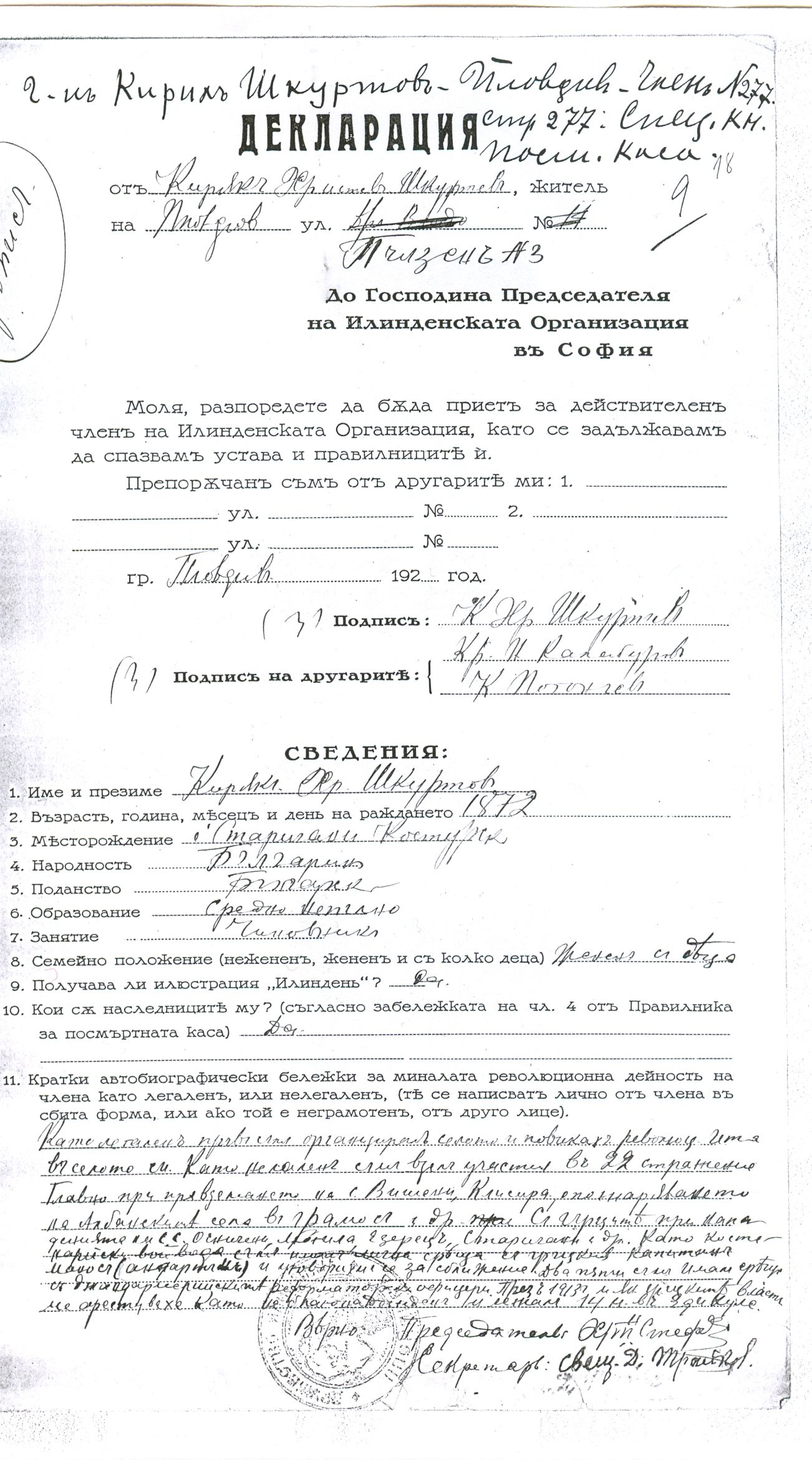 Препис на Декларацията на Киряк Шкуртов (1872-1965) от с. Старичани, Костурско за постъпване в Илинденската организация. Източник - Централен държавен архив, ф. 1075к, оп.1, а.е. 36а, л. 18